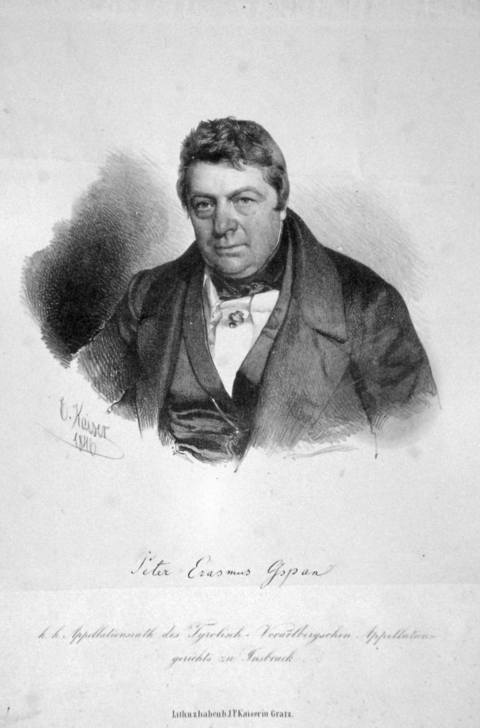 Peter Erasmus von Gspan (1790-1864), Jurist Politiker, Abgeordneter. Lithographie von Eduard Kaiser, 1846